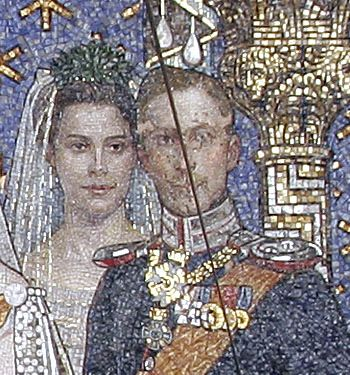 Kronprinzessin Cecilie with Kronprinz Wilhelm von Preußen on a mosaic in Kaiser-Wilhelm-Gedächtniskirche, Berlin